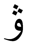 Arabic letter ve (Turkic alphabets)